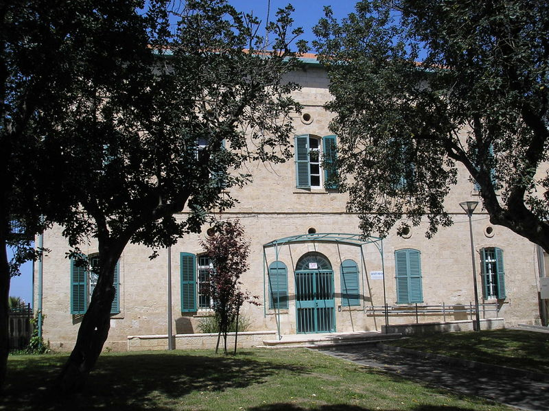 Carnelheim - the German Colony on Carmel Mountain (today part of the Carmel Centre neighborhood) Beit Hect בית הכט כרמלהיים - מושבה גרמנית שעל הכרמל כיום חלק משכונת מרכז הכרמל בחיפה